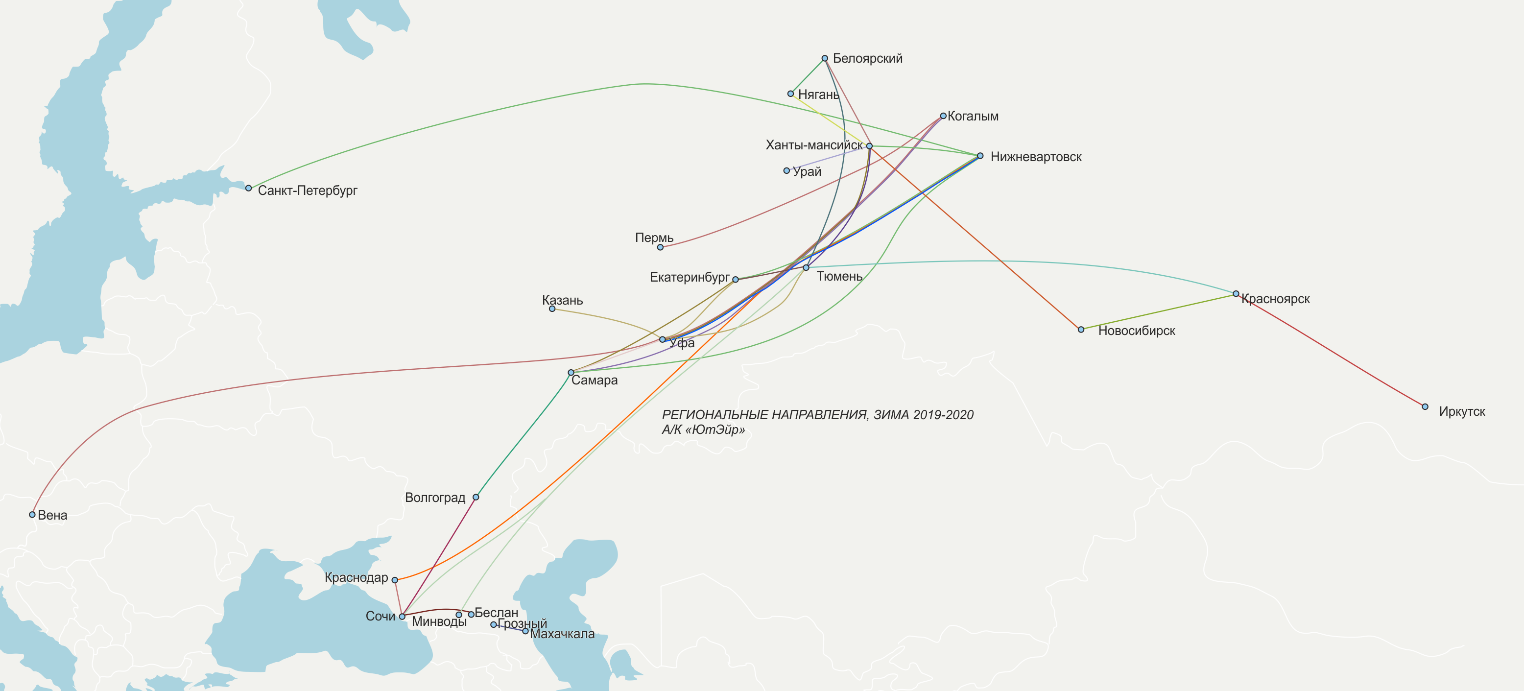 по расписанию зима 2019-2020